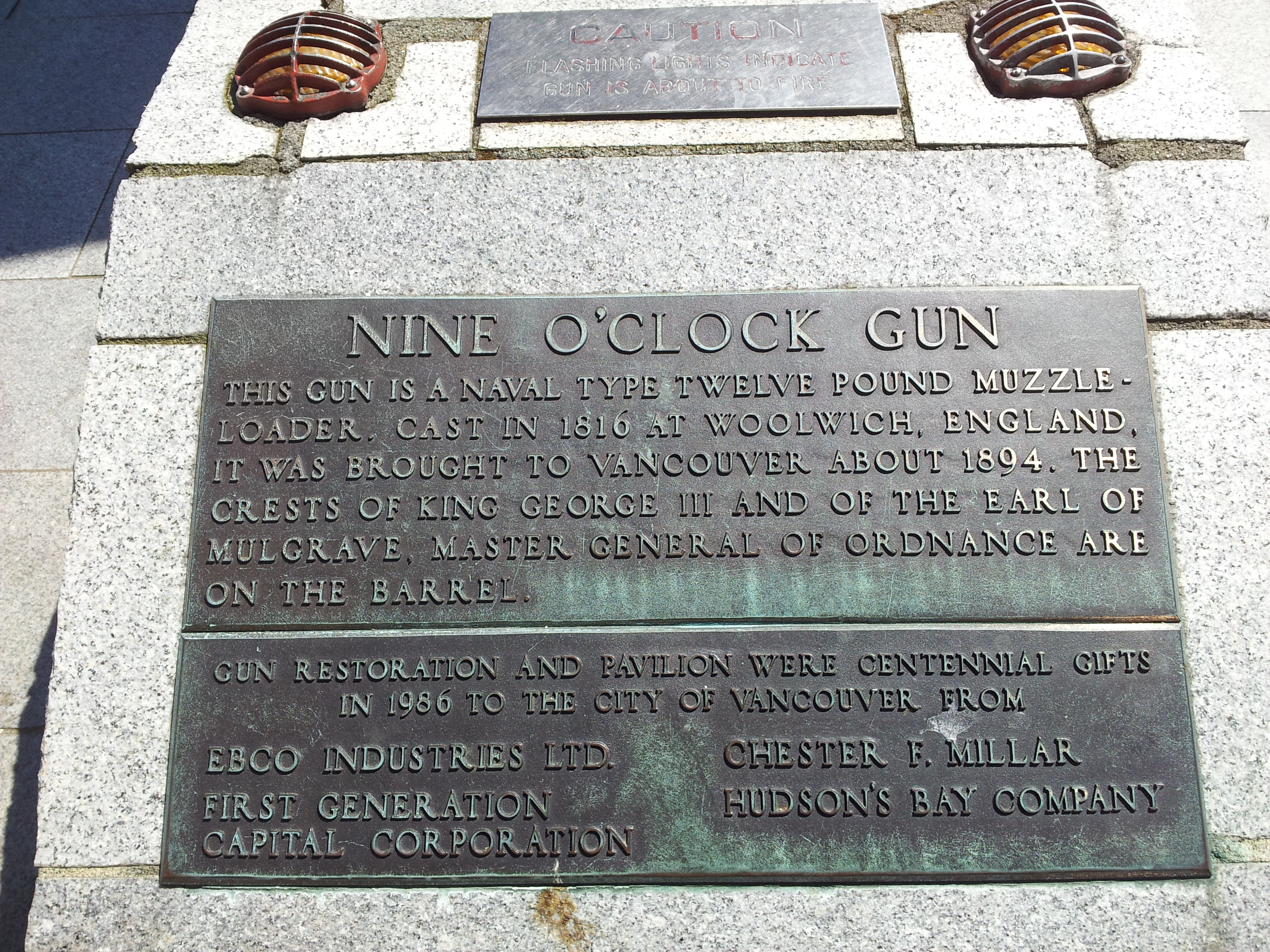 Inschrift 9 o clock gun Vancouver